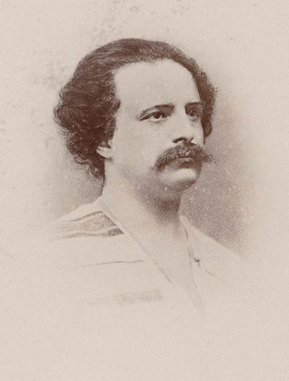 Portrait photographique de Charles Hugo, avant 1870. Atelier Nadar. Bibliothèque nationale de France, département Estampes et photographie, FT 4-NA-237 (6)